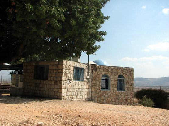 מבנה הקבר מעל מקום ציונו של הנביא חבקוק בפאתי היישוב חוקוק